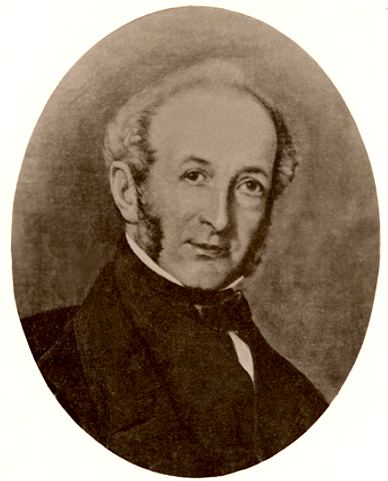 Marc Pascal de Sales Laterrière